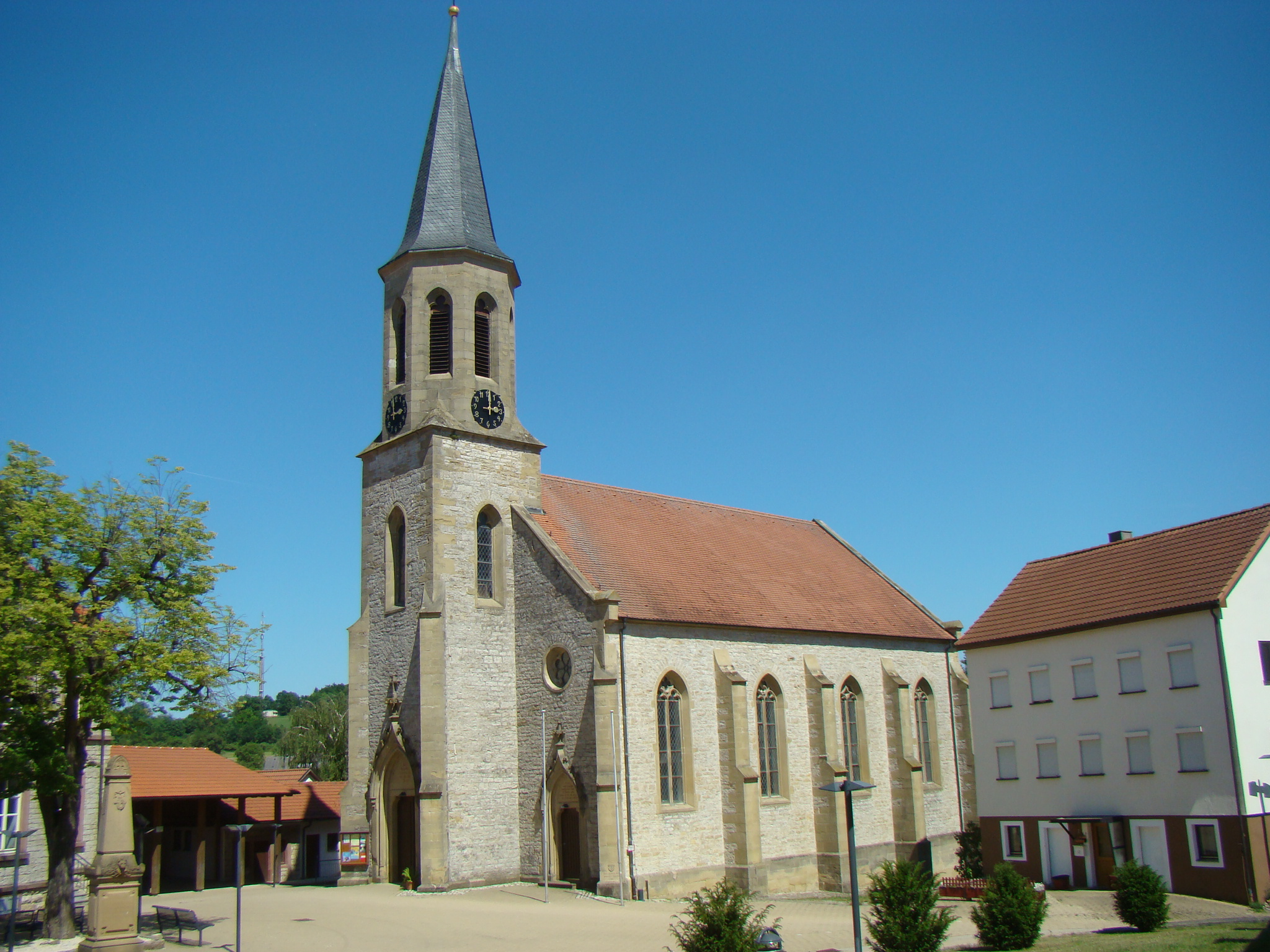 Kirche in Merchingen (Ravenstein)